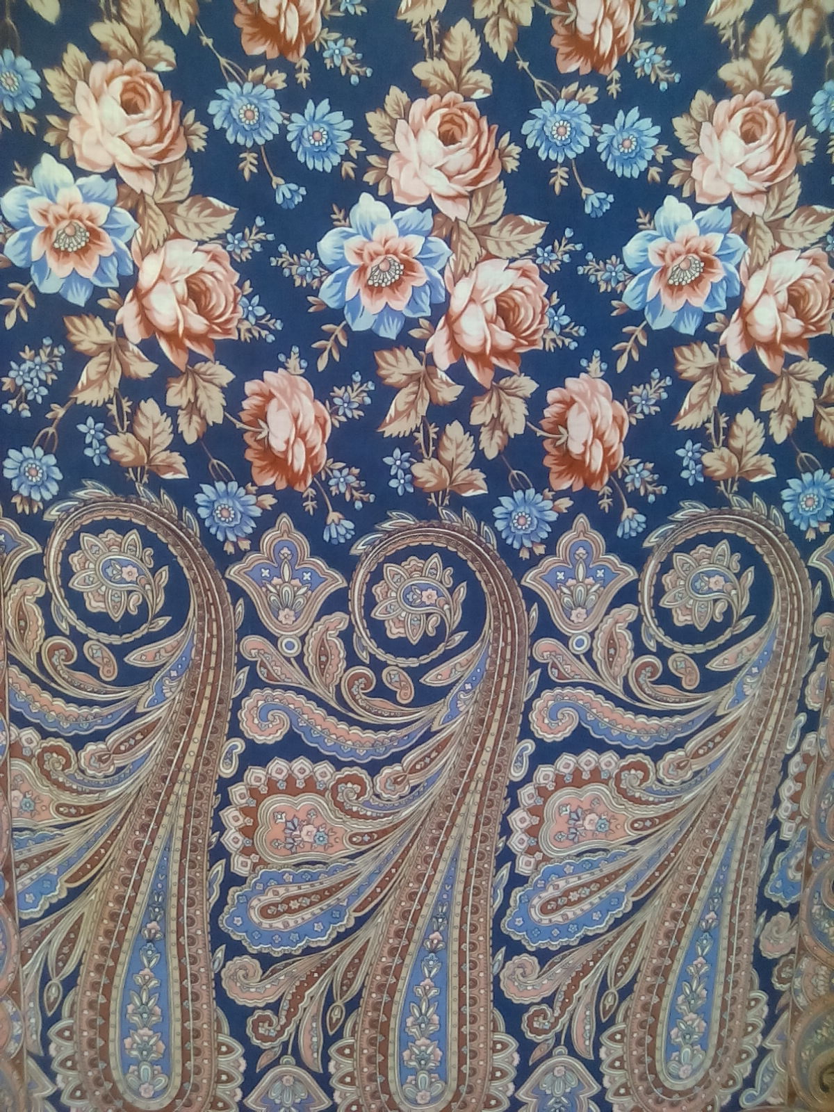 Палантин чистошерстяной с шелковой бахромой, 170х200